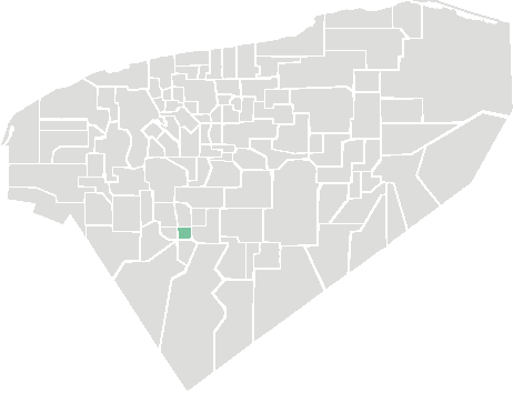 locatie van de gemeente Maní in Yucatán